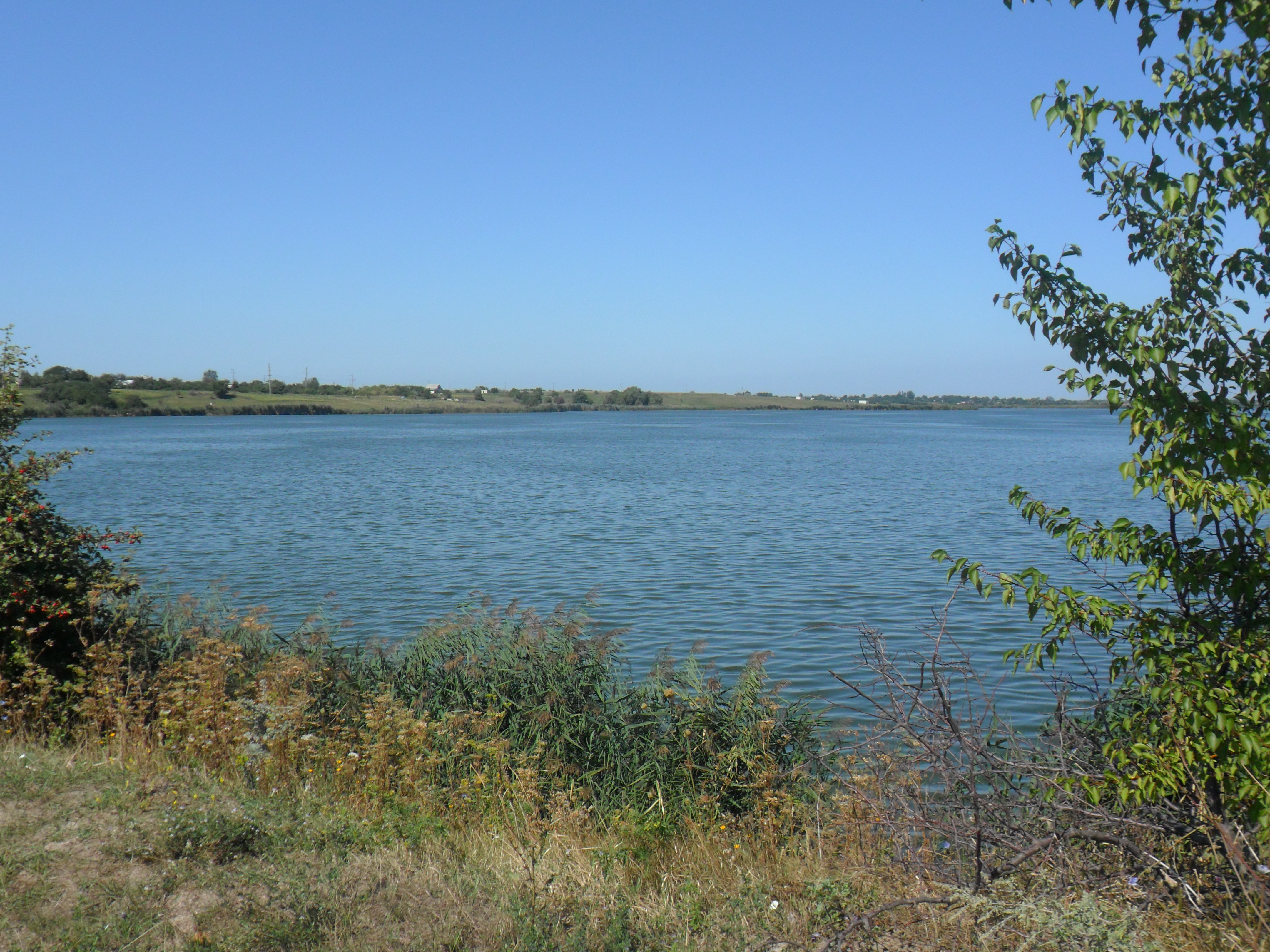 Ставок у селі Погреби, Глобинський район, Полтавська область